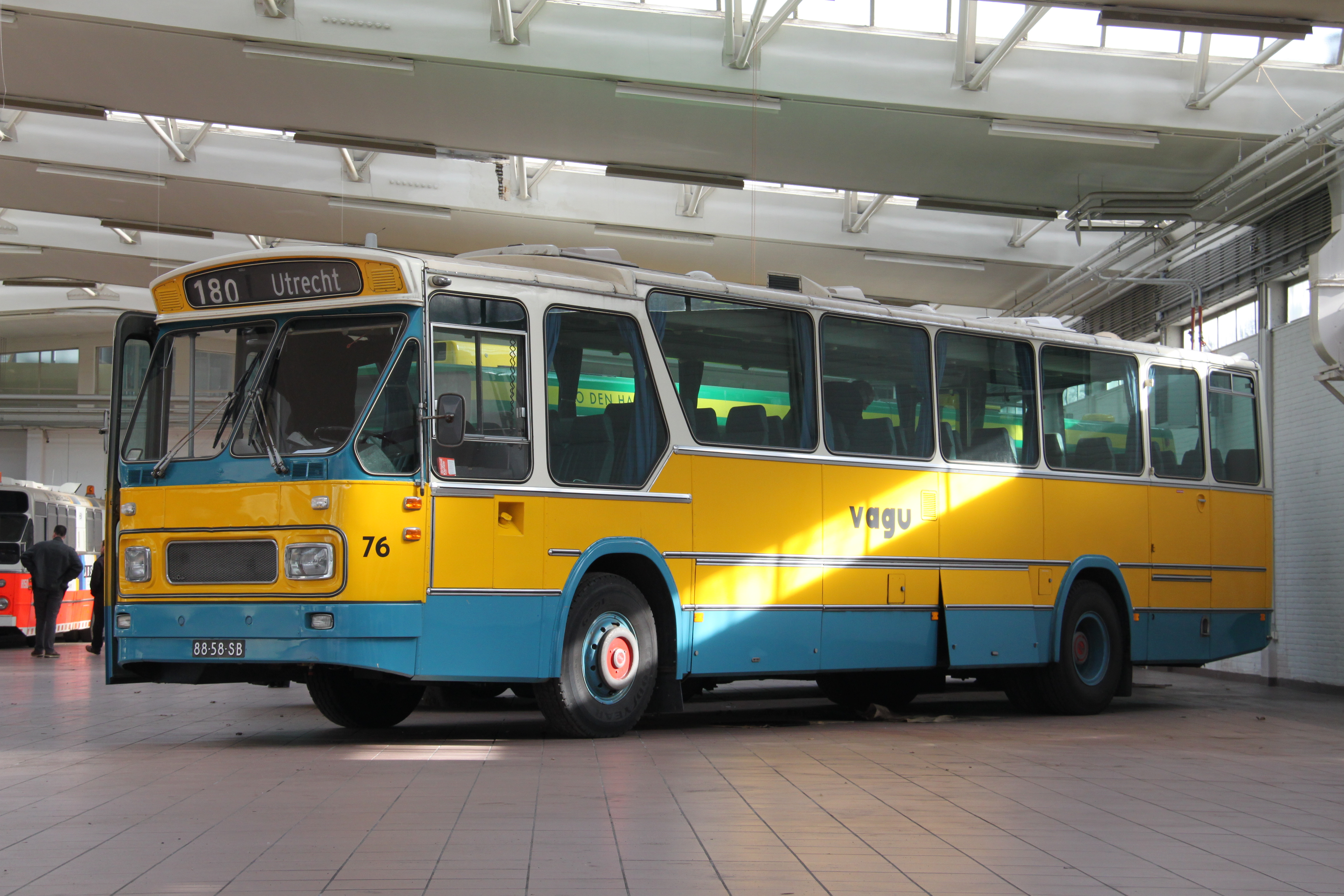 De VAGU 76 Leyland-Den Oudsten LOB semitoer in een loods van het Haags Bus Museum in Den Haag.